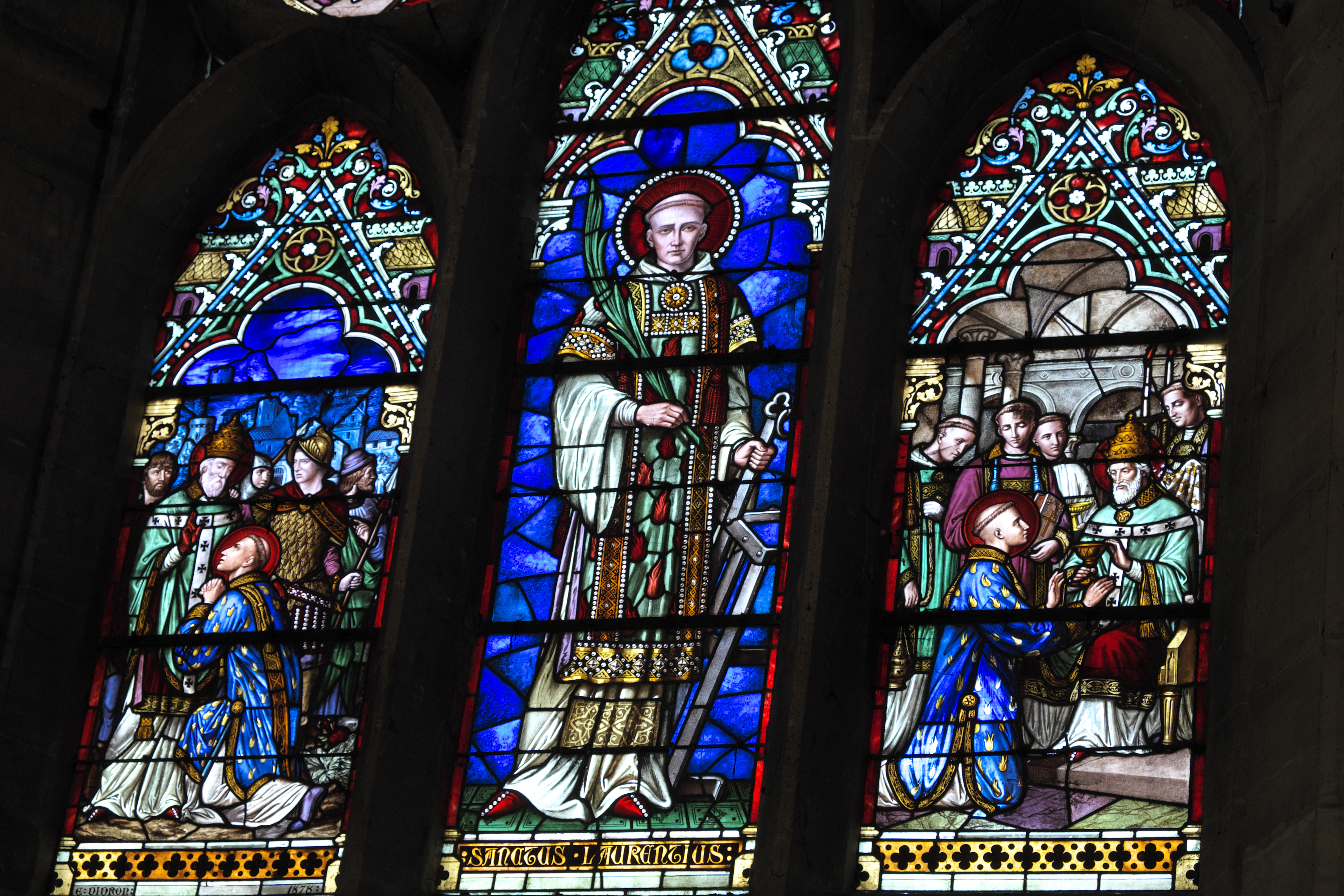 Katholische Pfarrkirche Saint-Laurent in Beaumont-sur-Oise im Département Val d'Oise (Île-de-France/Frankreich), Bleiglasfenster im Chor mit der Signatur E. DIDRON 1878, Darstellung: Szenen aus der Legende des hl. Laurentius (Ausschnitt)